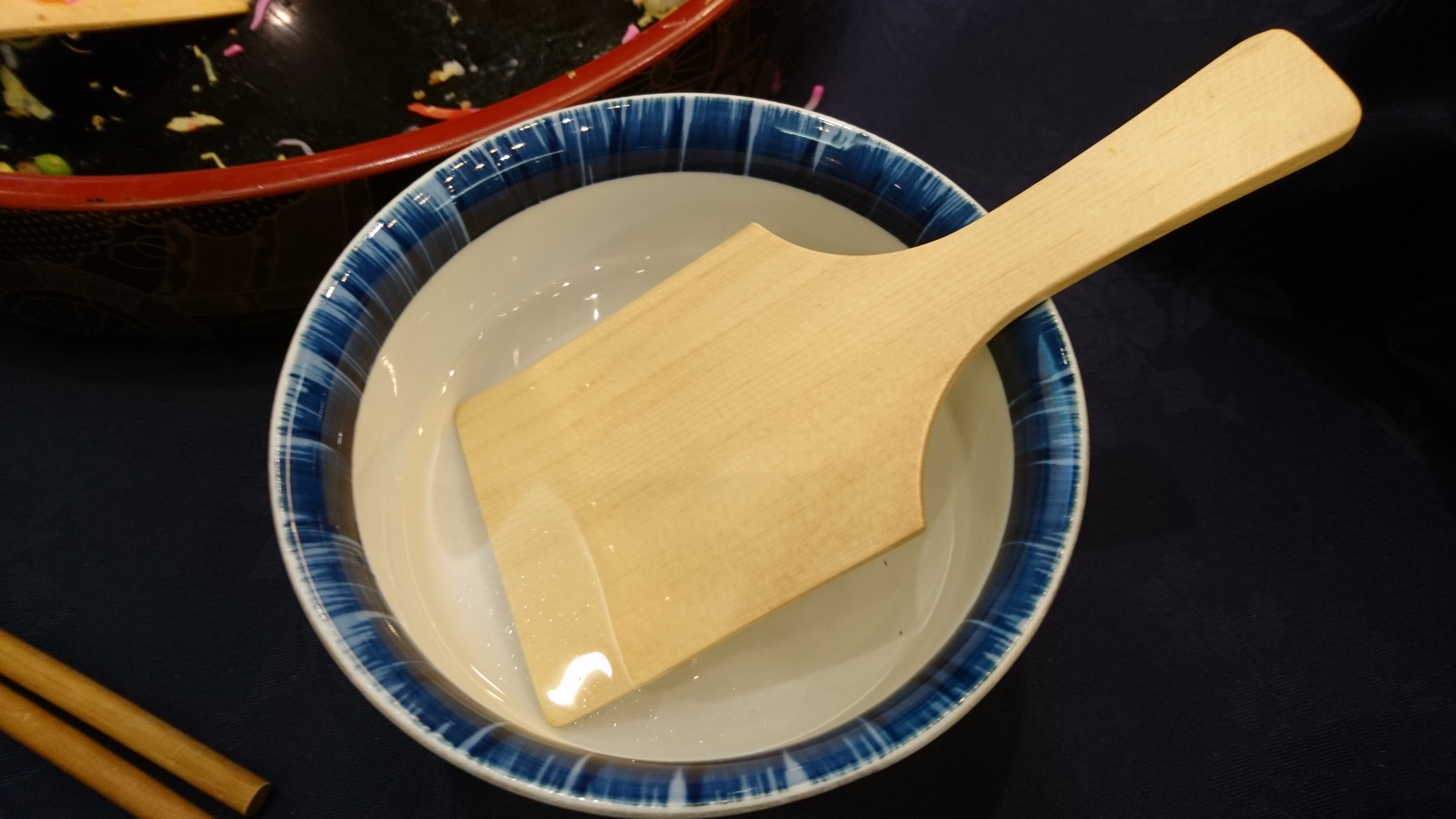 丹後地方の郷土料理ばらずしを切り分けるために用いられる木べら